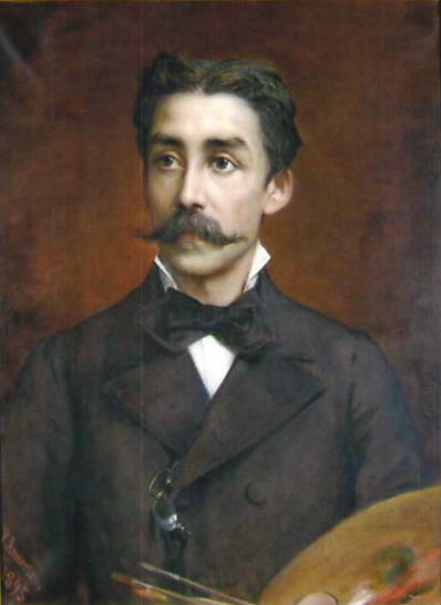 Auto-retrato de Pedro Américo